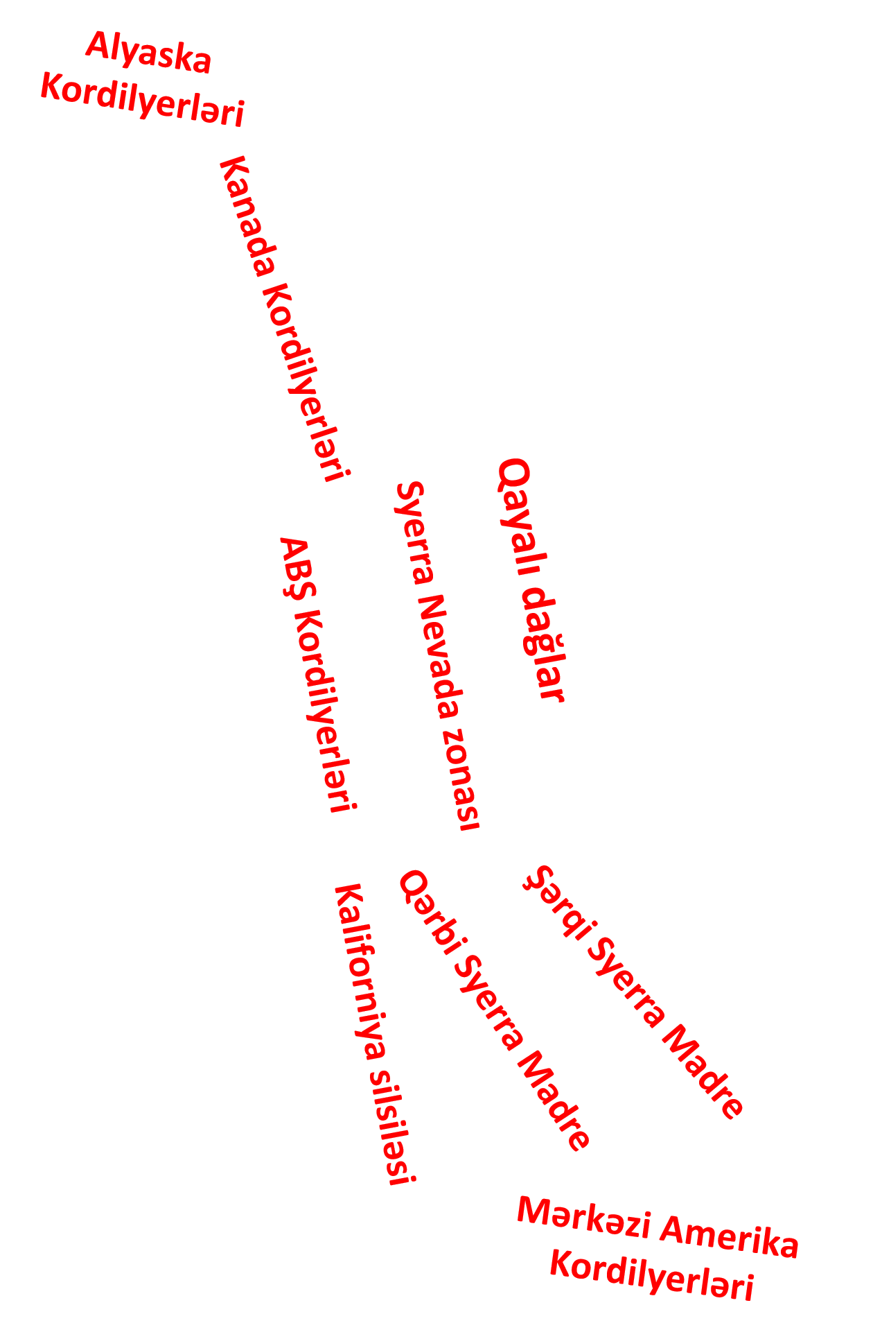 Şəkildə Şimali Amerika Kordilyerlərinin tektonik və morfostruktur zonaları əks olunmuşdur